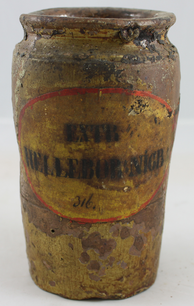 Zylindriches Standgefäß mit kurzem Hals und weiter Mündung; die braunfarbene Glasur wurde mit Ölfarbe überstrichen: Grundfarbe grau bis ockerfarben; Schild: oval mit rotfarbener Umrandung und schwarzer Beschriftung: "E / HELLEB. NIGR. / 26j.", darunter mit einer Speichenähnlichen Darstellung verziert. Über der Beschriftung rechteckiges Papieretikett mit Schrift (schwarz auf weißen Grund): "Stern-Apotheke, Altona-E. / Adolfstr. 96, Fernspr. Hansa 4344 / H. Mammen.", gegenüberliegen der Beschriftung ein weiteres (jüngeres) ovalförmiges (vermutlich mit Ölfarbe gemaltes) Schild (schwarz auf ockerfarbenem Grund) mit roter Umrahmung: "EXTR. / HELLEBOR. NIGR / 316.". Kein Stöpsel bzw. Verschluss vorhanden. Reste einer Befüllung. Extractum Hellebori nigri = Extrakt aus dem Rhizom der schwarzen Nieswurz (Helleborus niger). GIFTIG. Früher meist in der Tiermedizin verwendet: reizende und narkotische Wirkung. Nieswurz war Bestandteil von Niespulvern. Heute ist die "Christrose" eine Zierpflanze mit Blüten im Winter. Stern-Apotheke, Atona-E. Adolfstraße 96